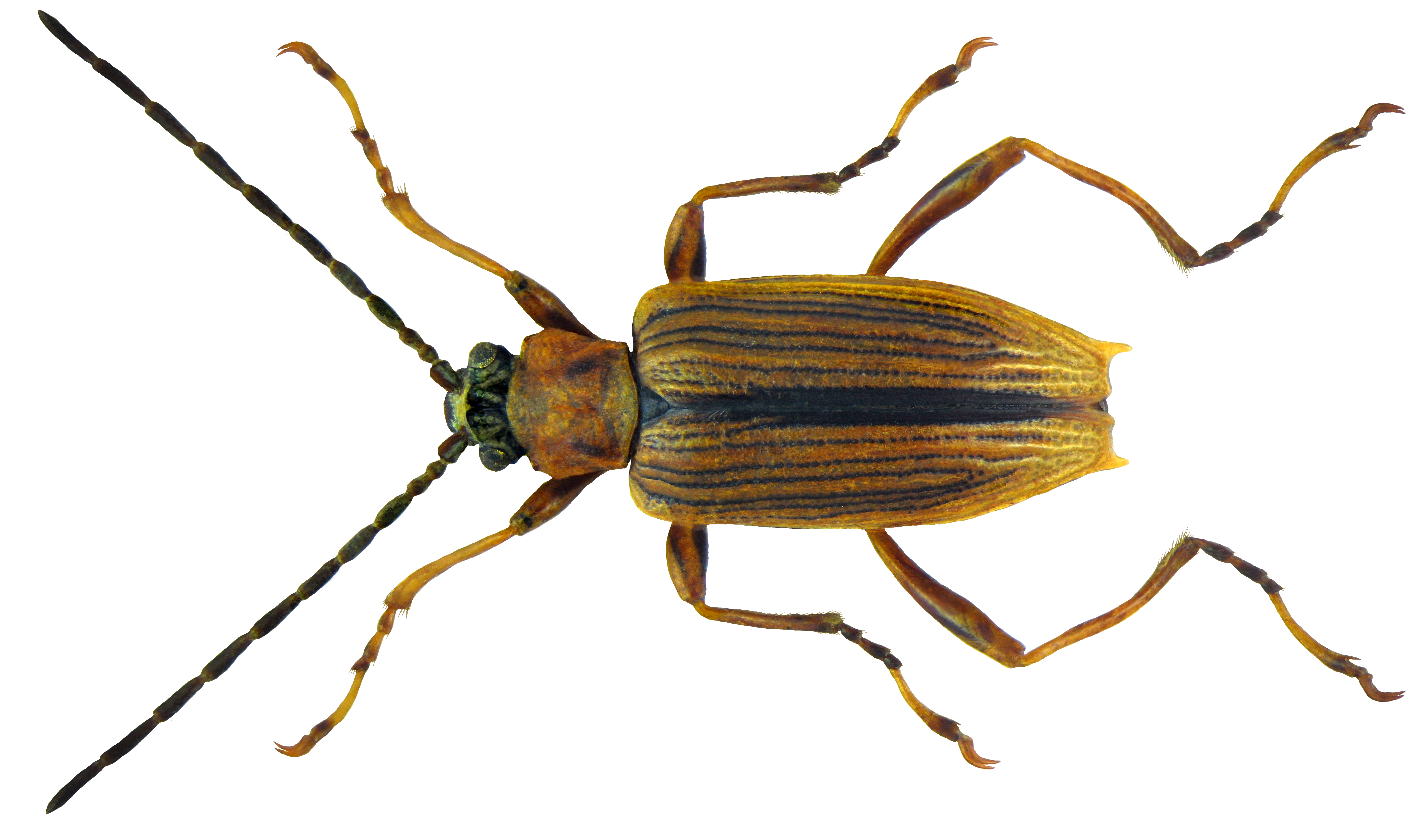 Macroplea mutica (Fabricius, 1792) Familie: Chrysomelidae Groesse: 4,5-6,0 mm Verbreitung: Mitteleuropa, südliches Nordeuropa Oekologie: im Brackwasser der Nord-und Ostsee an Ruppia maritima Fundort: England P.Harwood coll Pres, 1957; Coll. Museum Oxford Photo: U.Schmidt, 2011